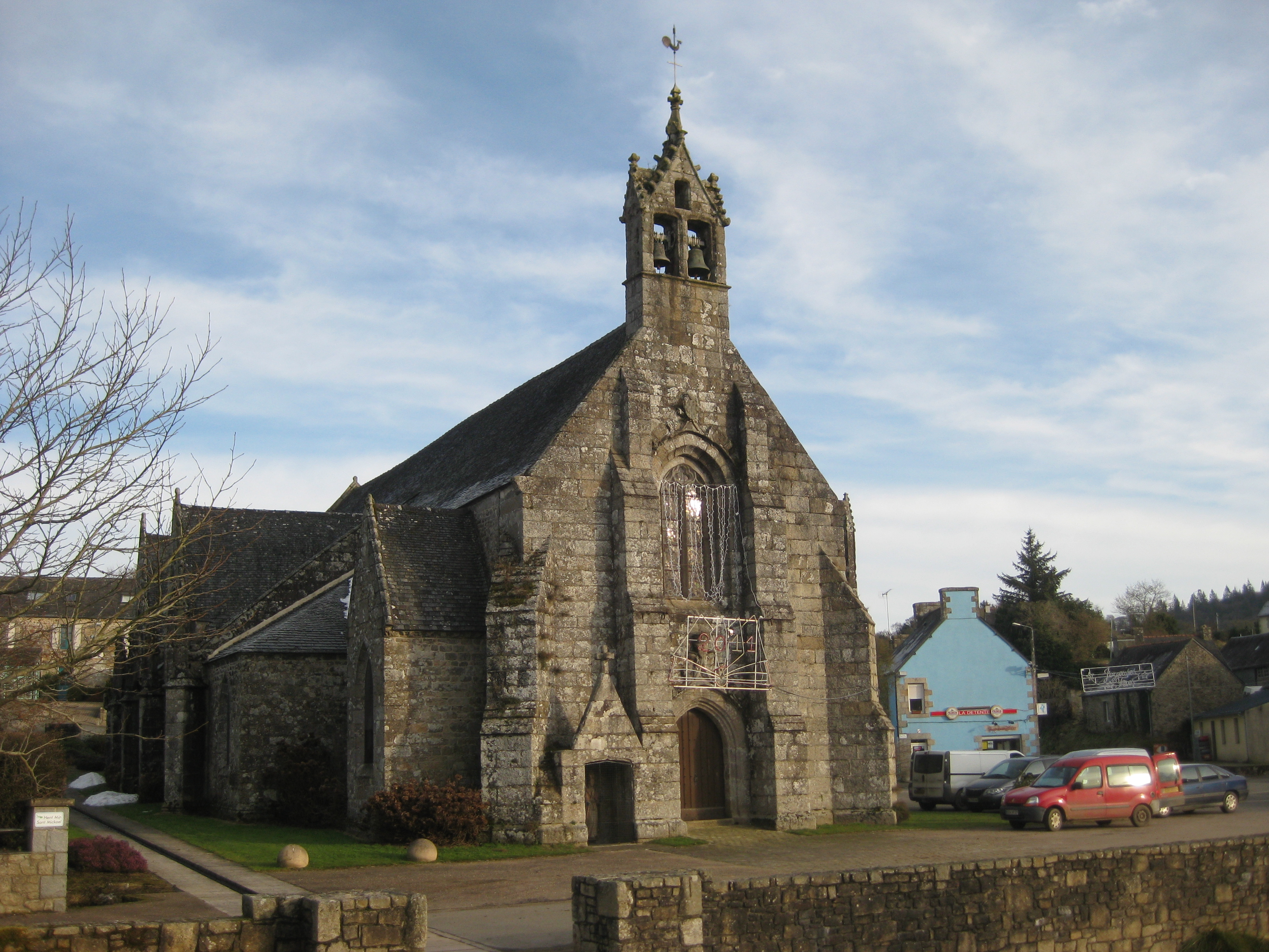 Eglise de Saint-Servais - Saint-Servais - Côtes d'Armor - France